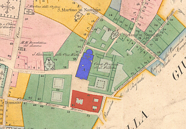 Piazza San Fedele e dintorni (Milano) estratto dalla mappa del catasto teresiano del 1751, riedizione del 1850, giurisdizione di Porta Nuova, tratto da in In blu è evidenziata la chiesa di San Fedele, in rosso il demolito Palazzo Sannazzari